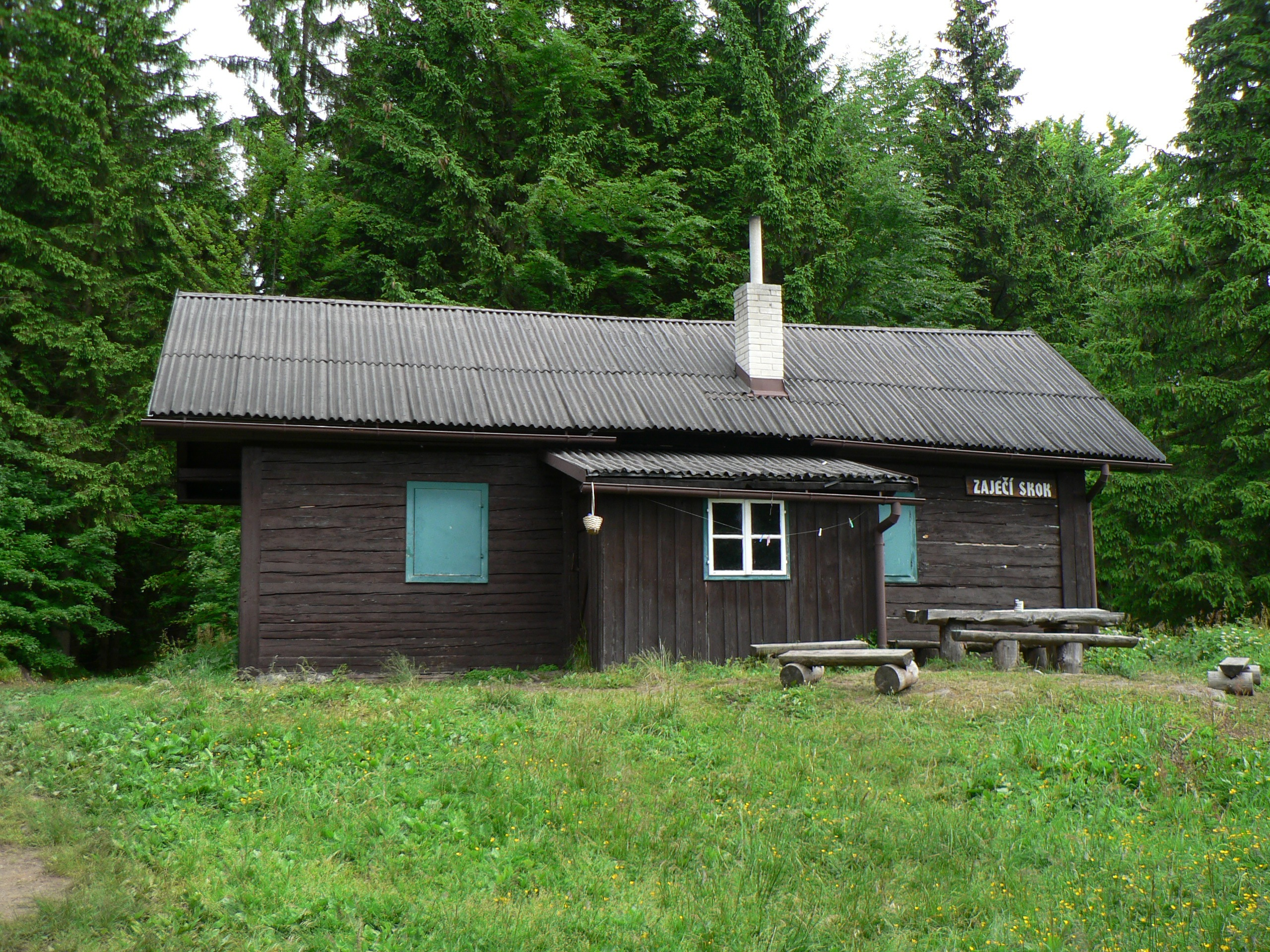 Lovecká chata Zaječí skok u Zaječí hory v Hrubém Jeseníku.